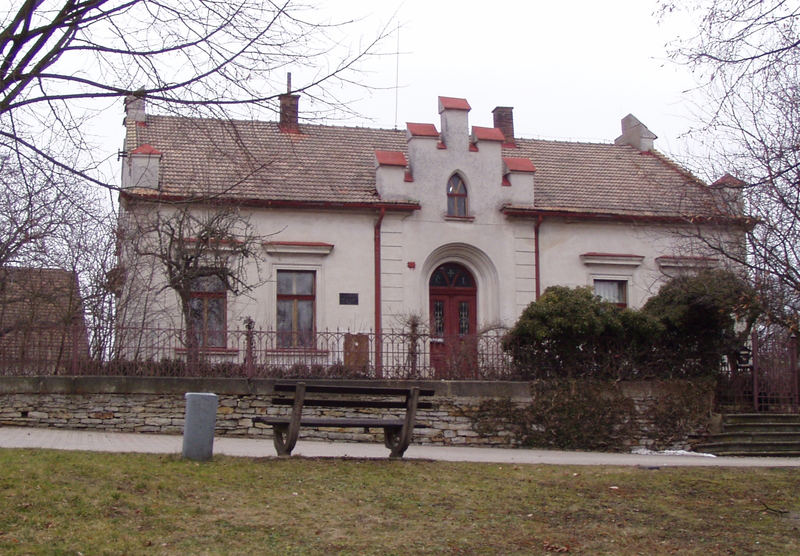 Bohuslavice - fara